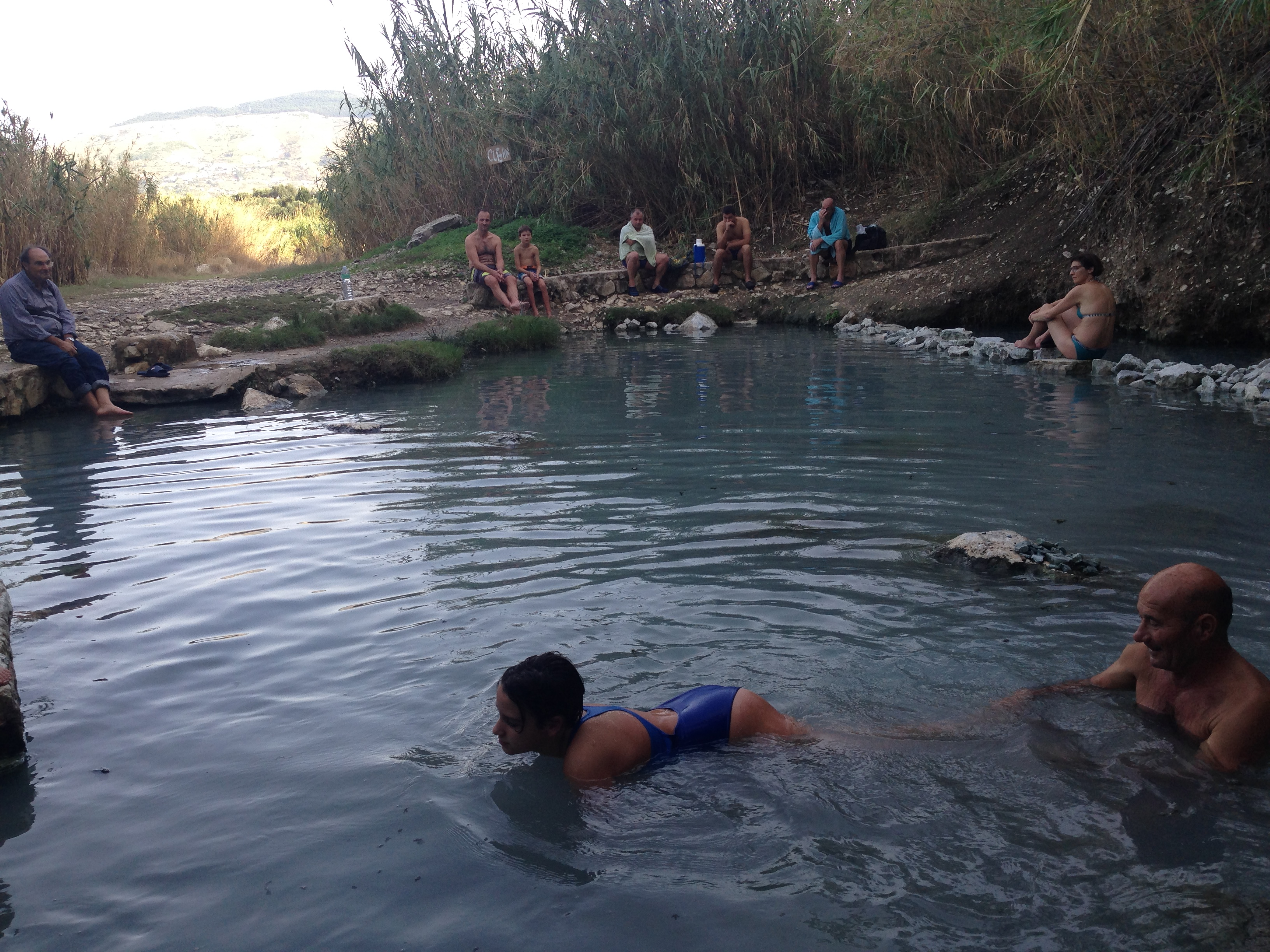 Libere terme segestane